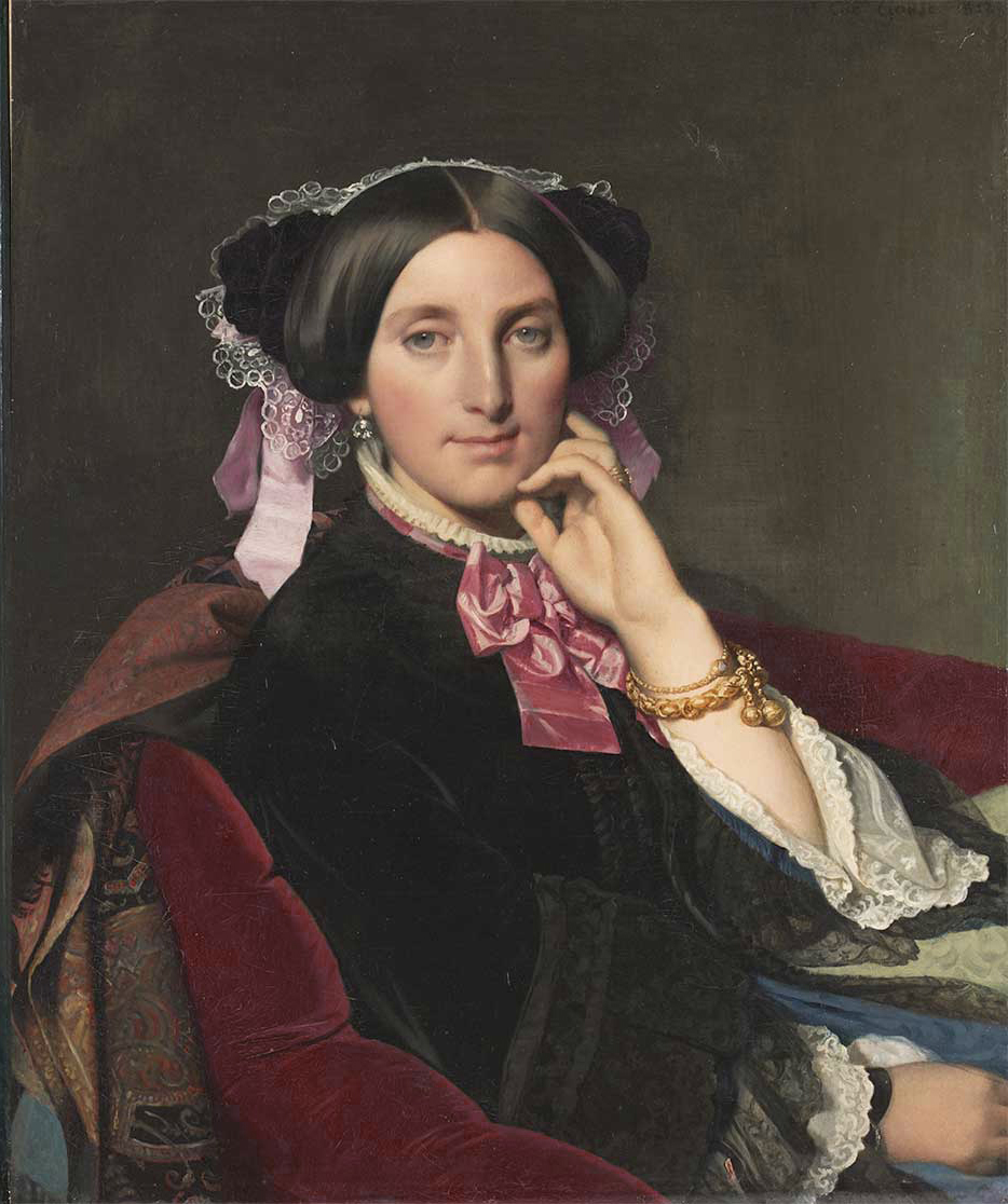 Portrait de Madame Gonse